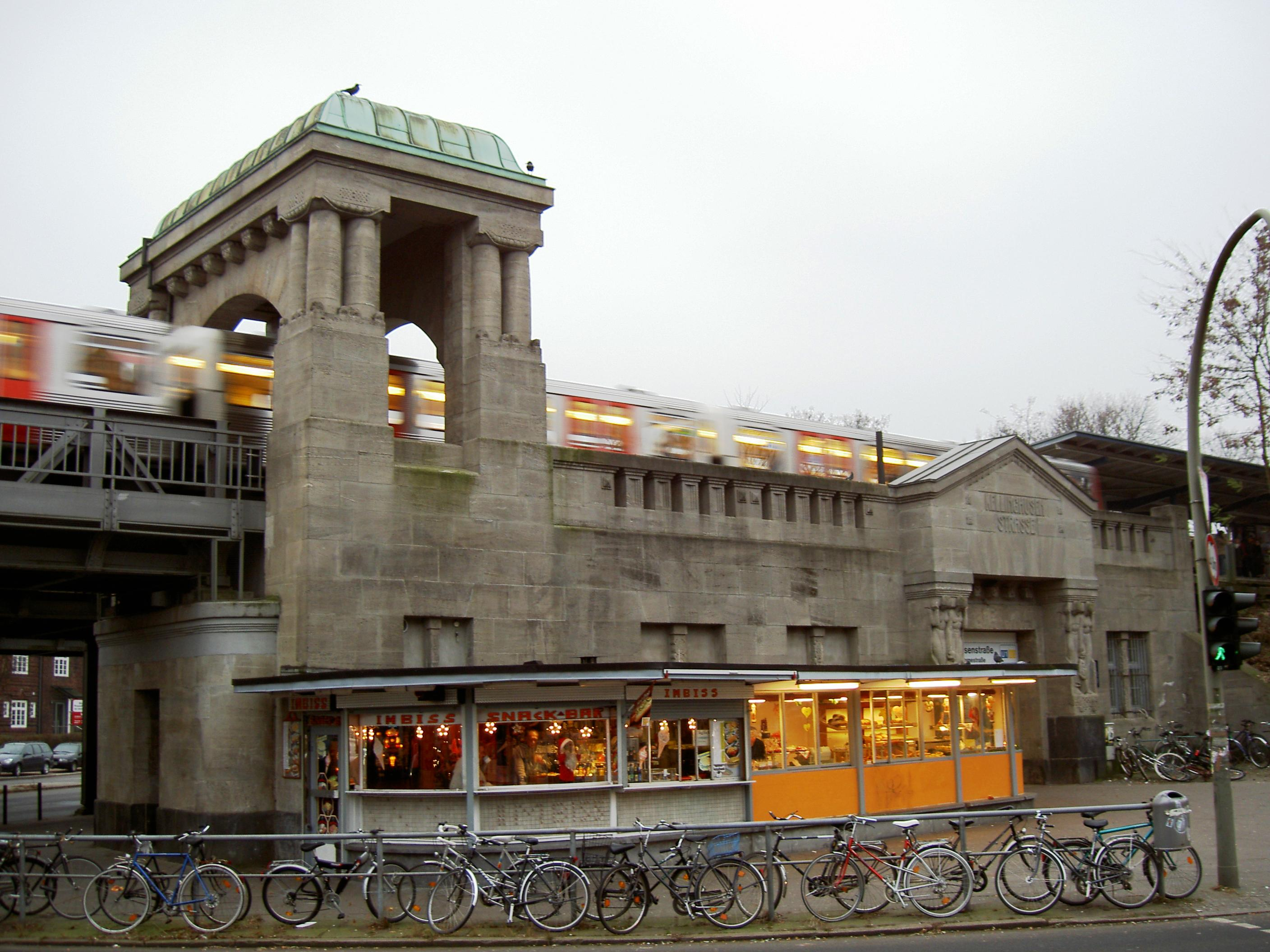 U-Bahn-Station Kellinghusenstraße in Hamburg